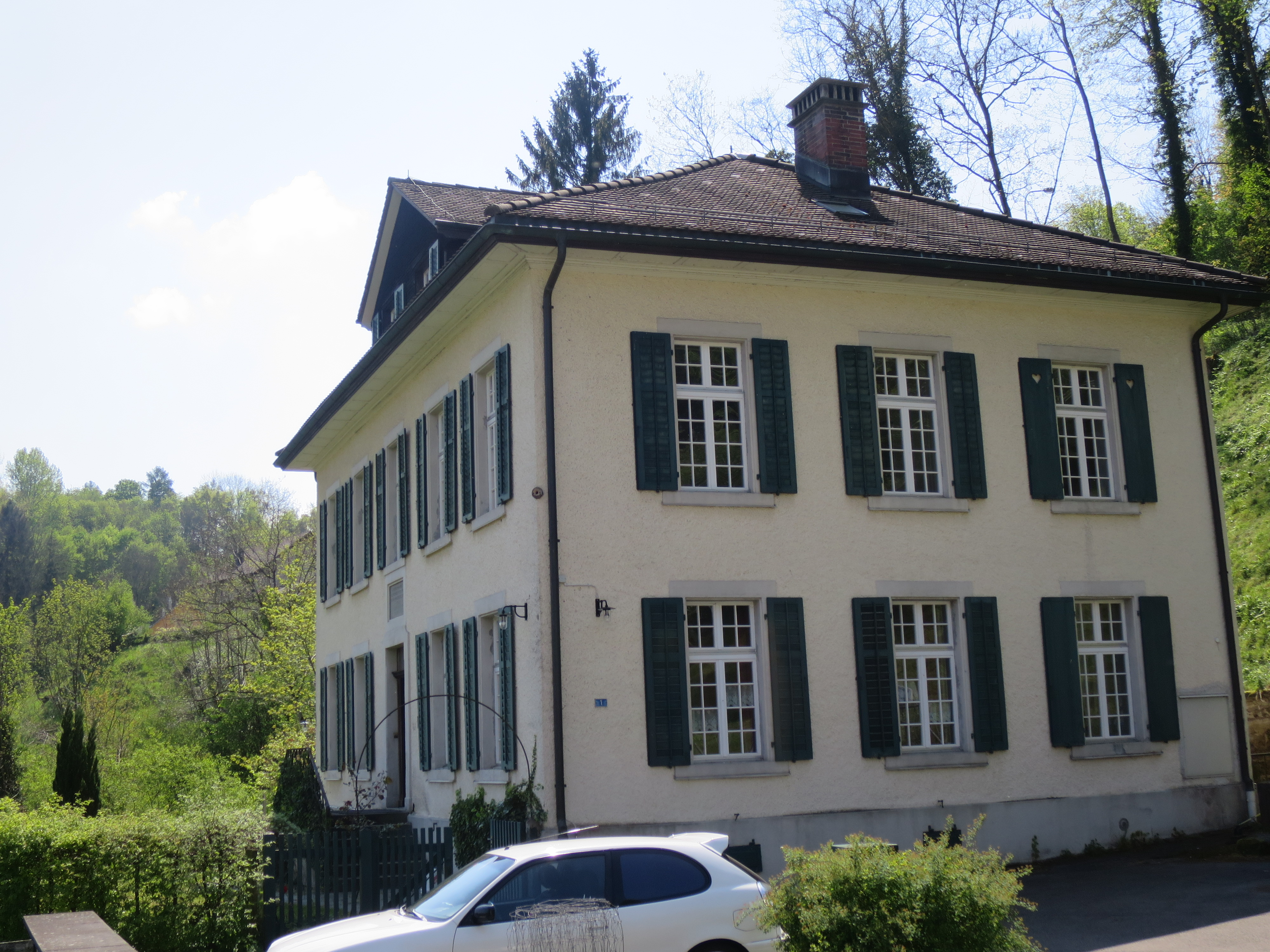 Reformiertes Pfarrhaus Rorbas (1773-76; Architekt: David Vogel)